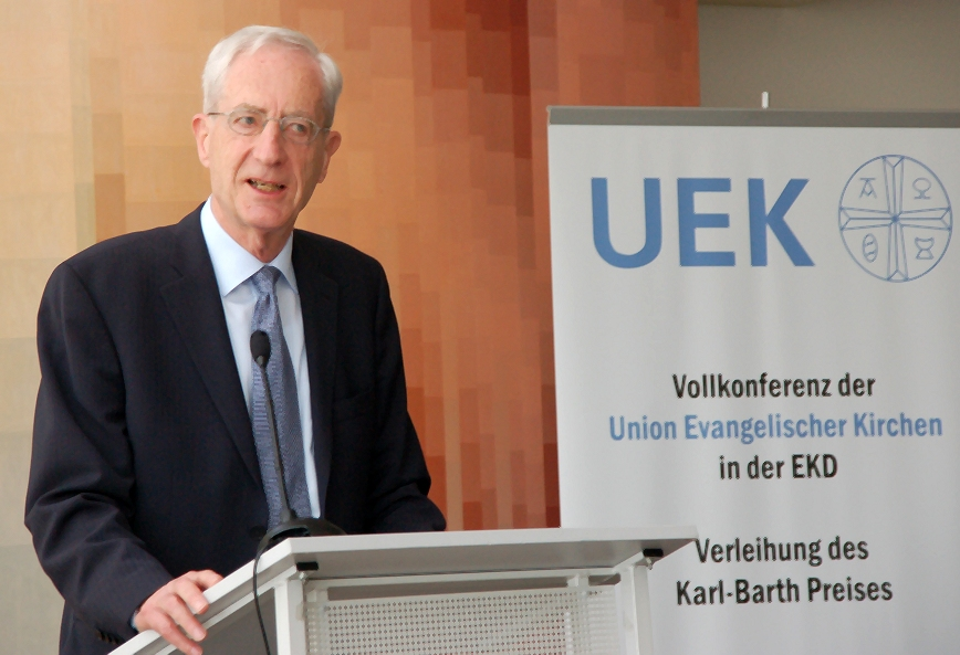 Jürgen Schmude, deutscher Politiker (SPD) und ehemaliger Bundesminister, bei der Entgegennahme des 2008 von der Union Evangelischer Kirchen (UEK) an ihn verliehenen Karl-Barth-Preises während der EKD-Synode vom April/Mai 2009 in Würzburg, Deutschland).